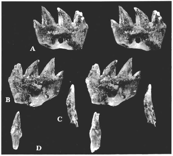 Ichthyoconodon jaworowskorum gen. et sp. n., right lower molar, holotype SA 46 in lingual (A), labial (B), anterior (C), and posterior [D) views. Stereophotos; x 10.